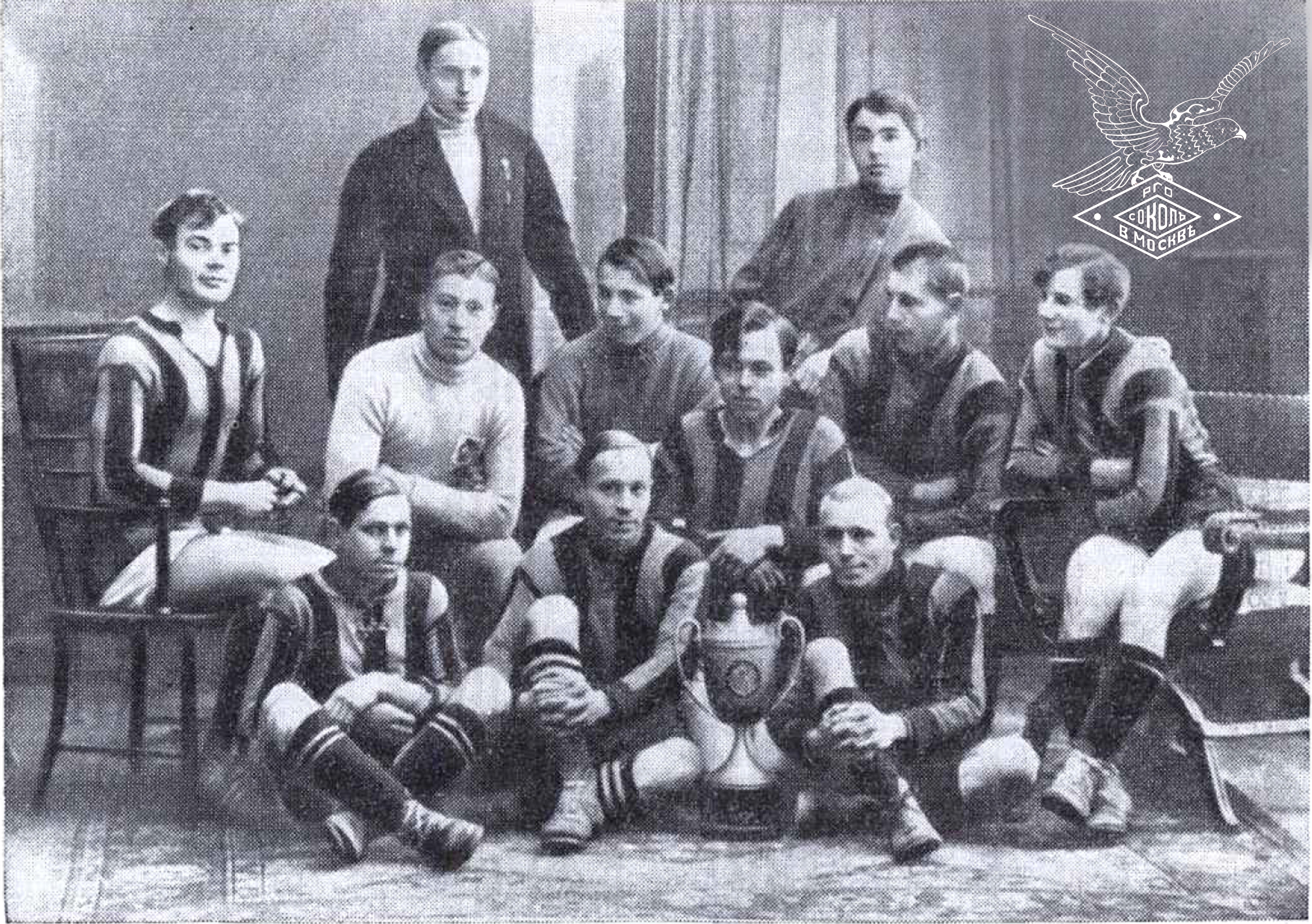 Футбольная команда РГО "Сокол" (Русское Гимнастическое Общество) выигравшая осенний чемпионат Москвы (Класс Б) - Кубок Мусси.